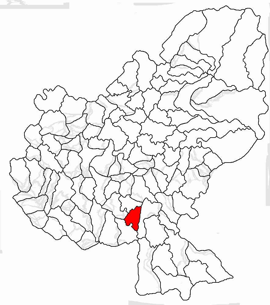 Categorie:Hărţi ale judeţului Mureş